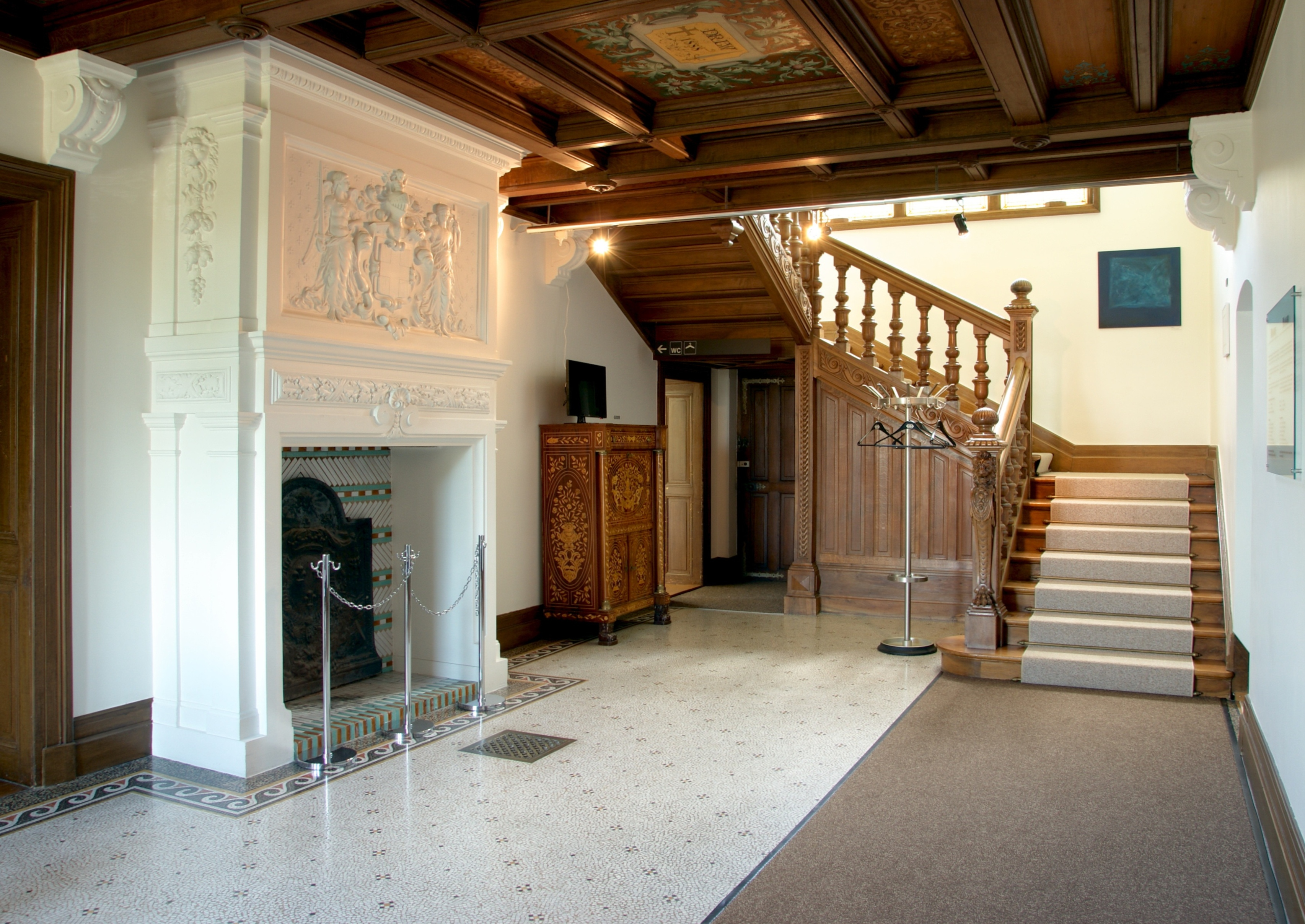 Entree in Schloss Löwenberg im Arts-and-Crafts-Stil mit Terrazzoboden.